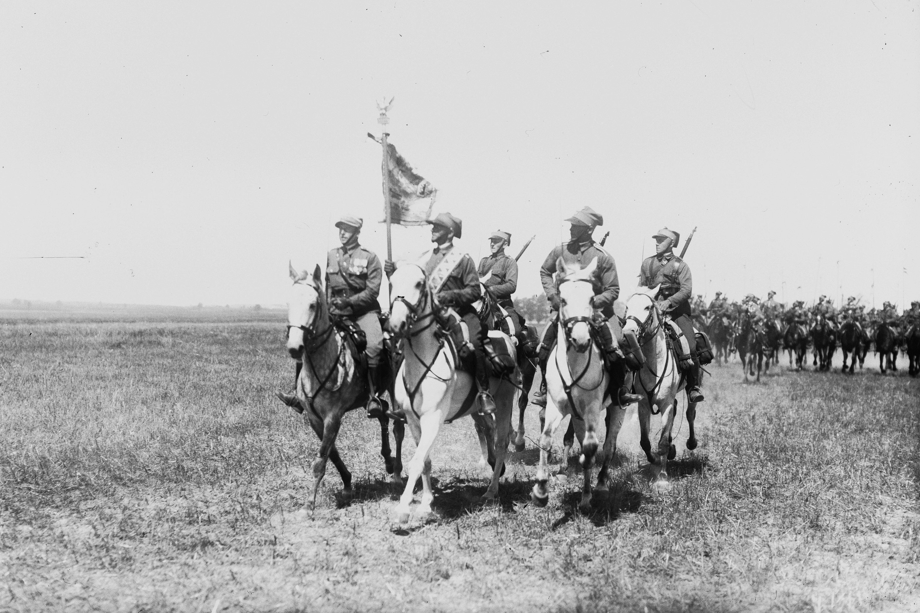 Defilada 4 Pułku Strzelców Konnych. Na przedzie poczet sztandarowy.